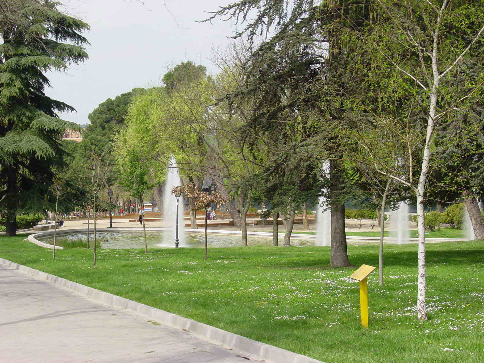 Madrid - Spain